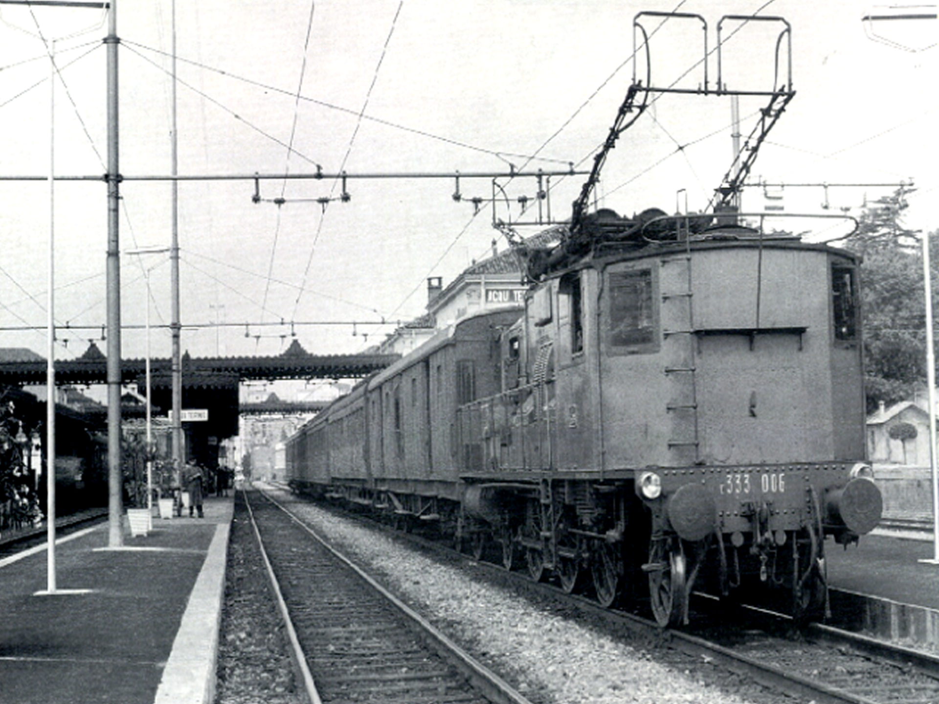 (Autore sconosciuto - Foto di locomotiva FS E.333.006 nella stazione di Acqui Terme (Inserimento di Horatius - Foto non particolarmente artistica probabilmente la licenza può essere trasformata in altra più libera - )